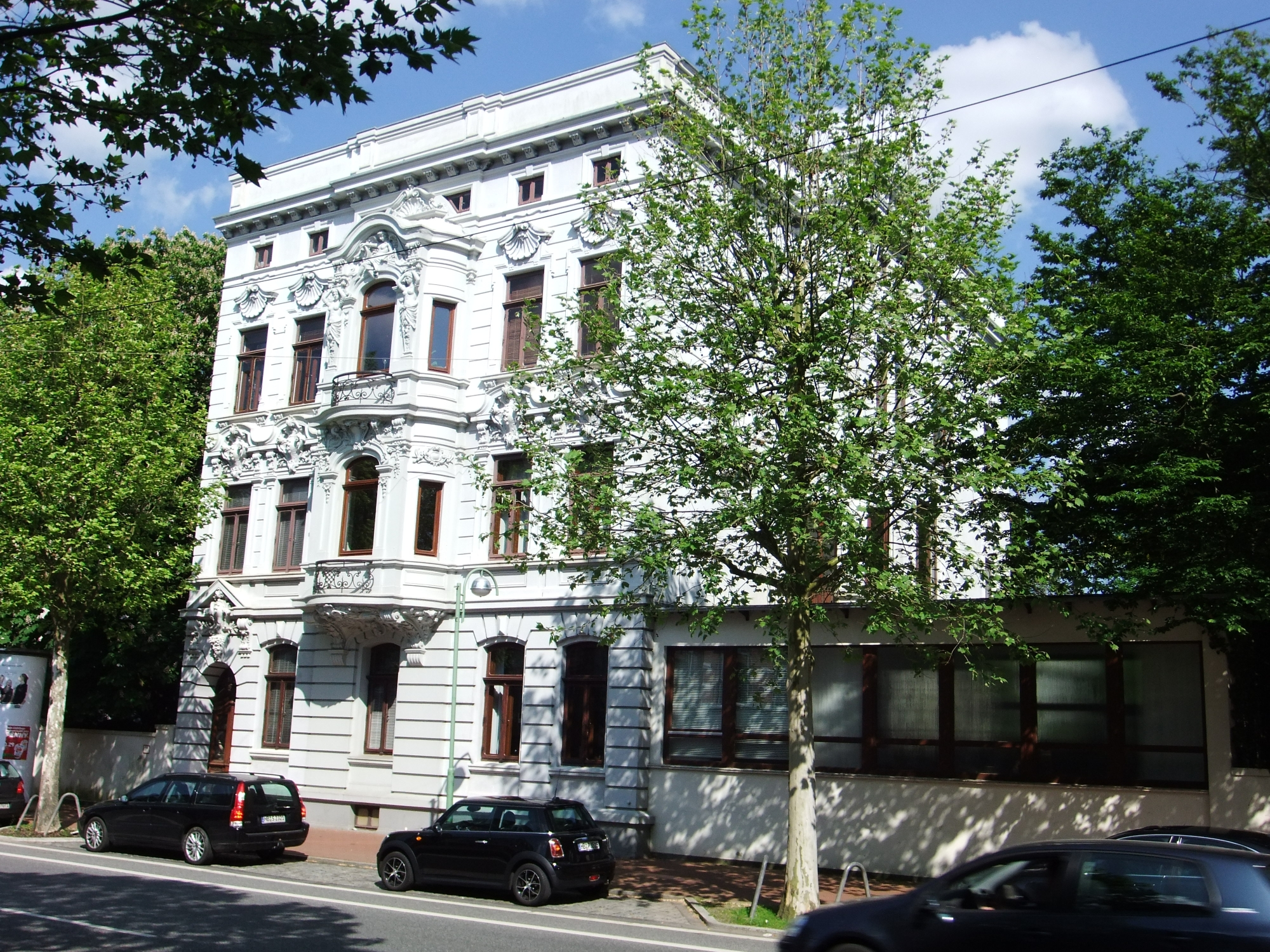 Villa Kistner in Bremerhaven, Hafenstraße 50. Das abgebildete Objekt ist ein geschütztes Kulturdenkmal in der Freien Hansestadt Bremen, mit der Nr. 1567 beim Landesamt für Denkmalpflege registriert.